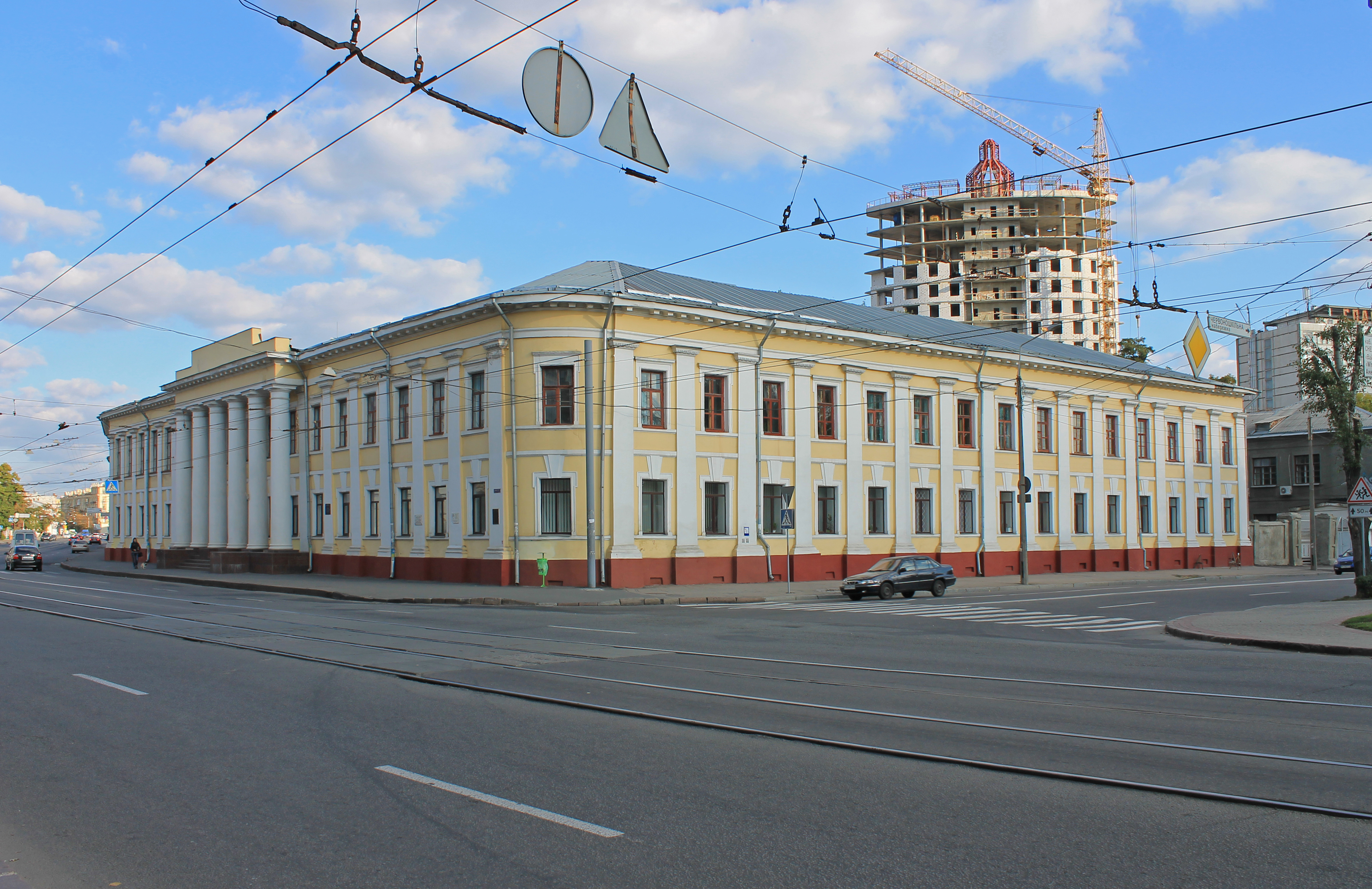 Будинок 1-ї чоловічої гімназії де вчився академік Вернадський В.І., просп. Московський, 24, м.Харків.